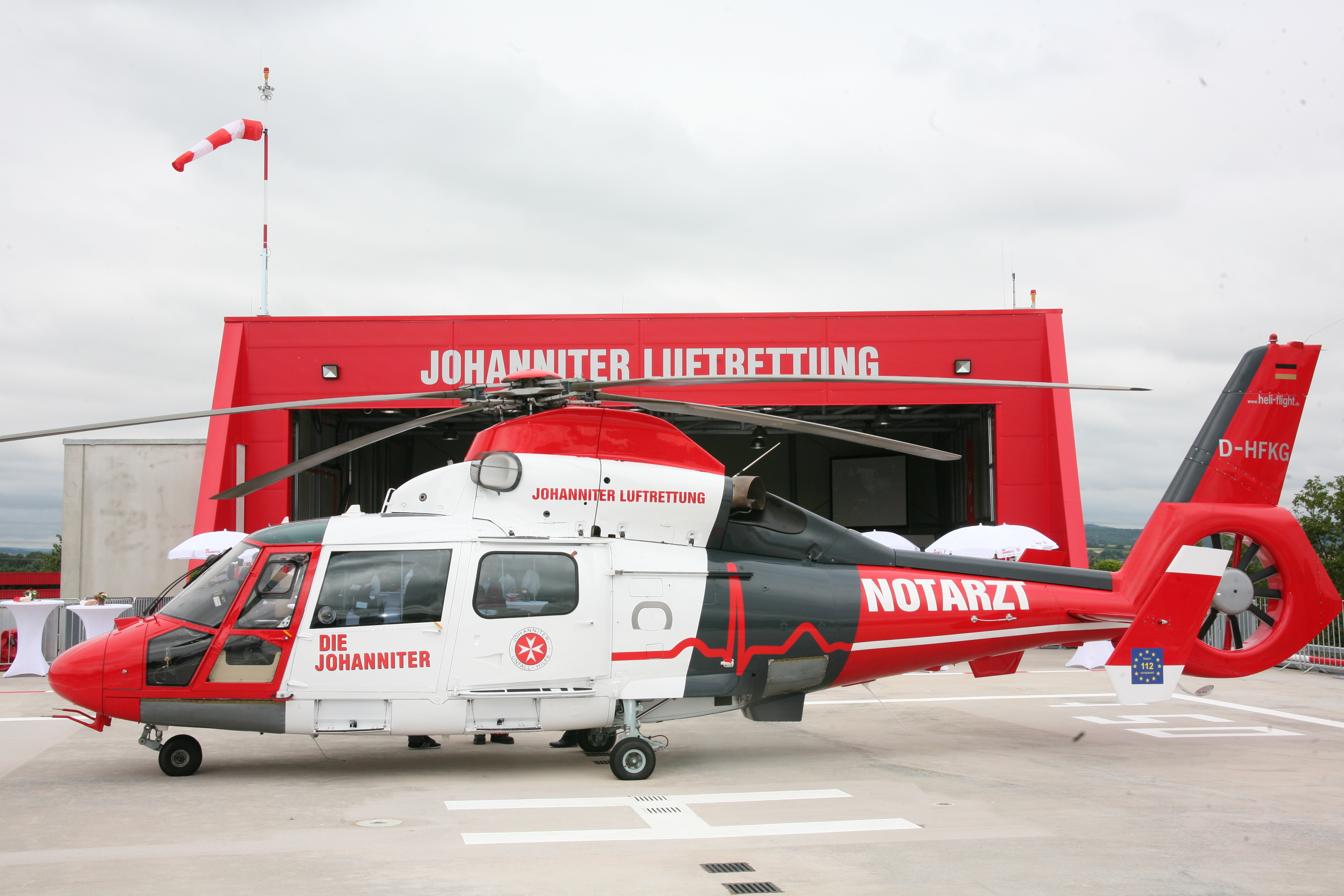 Christoph Gießen (D-HFKG) am Hangar im Luftrettungszentrum Gießen